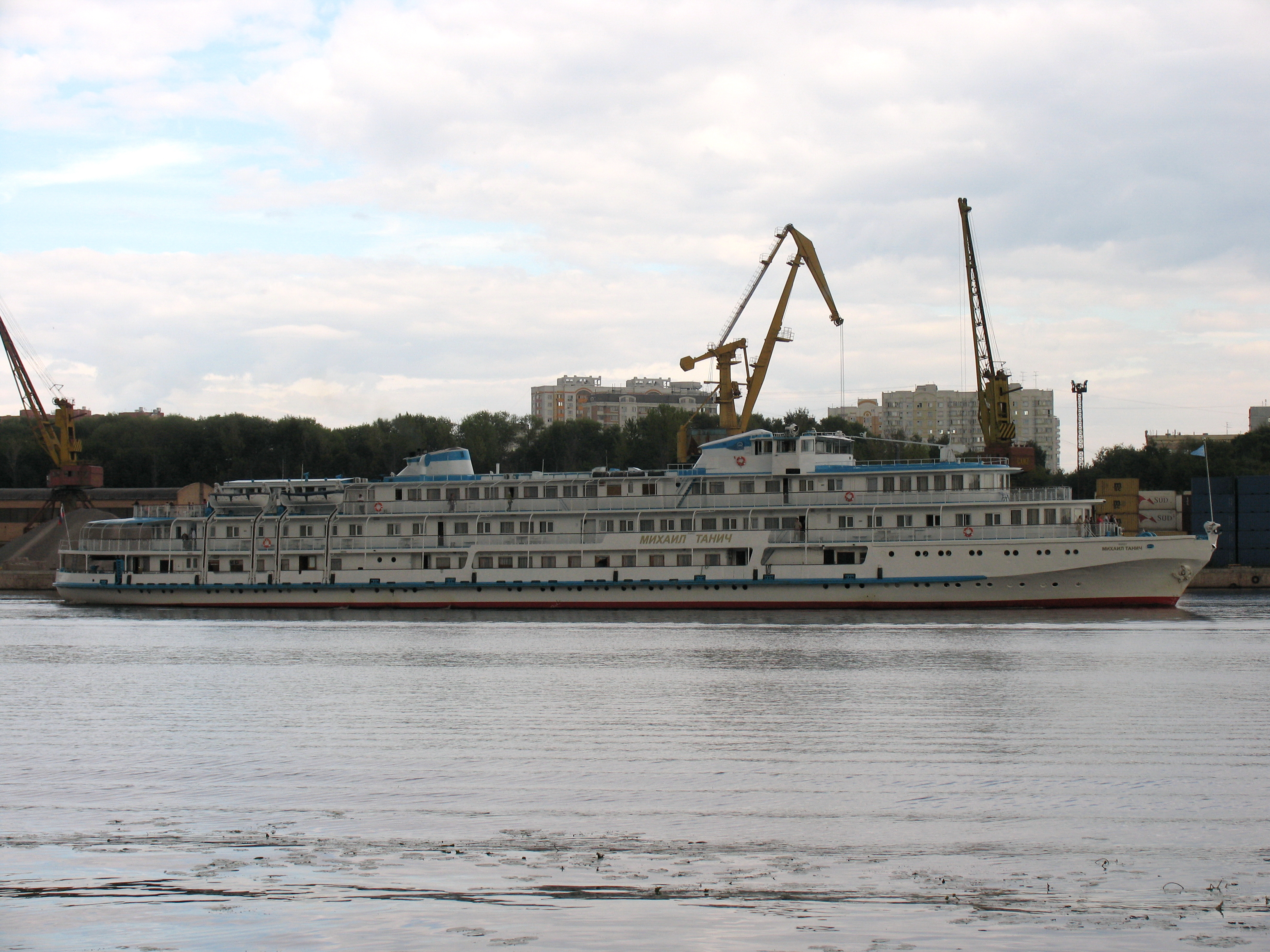 Речное круизное судно "Михаил Танич" В Северном речном порту, Москва.